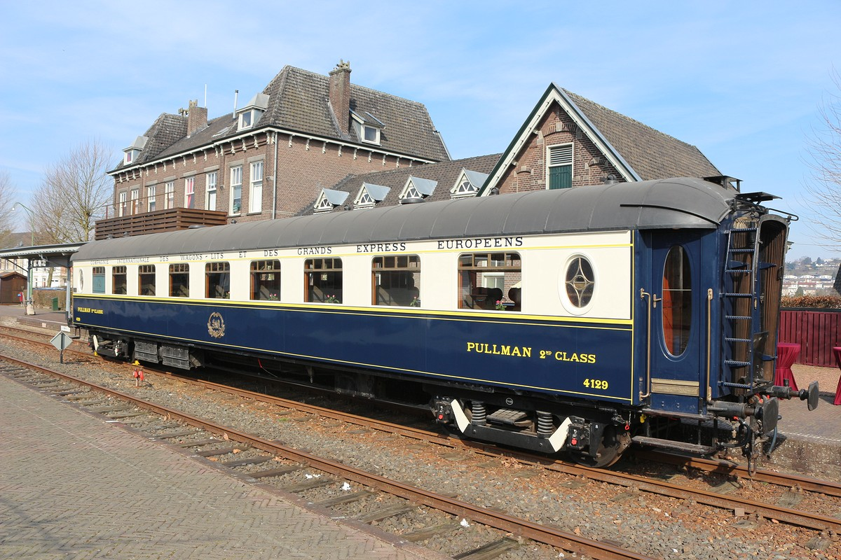 Het gerestaureerde Pullman-rijtuig van de Zuid-Limburgse Stoomtrein Maatschappij.